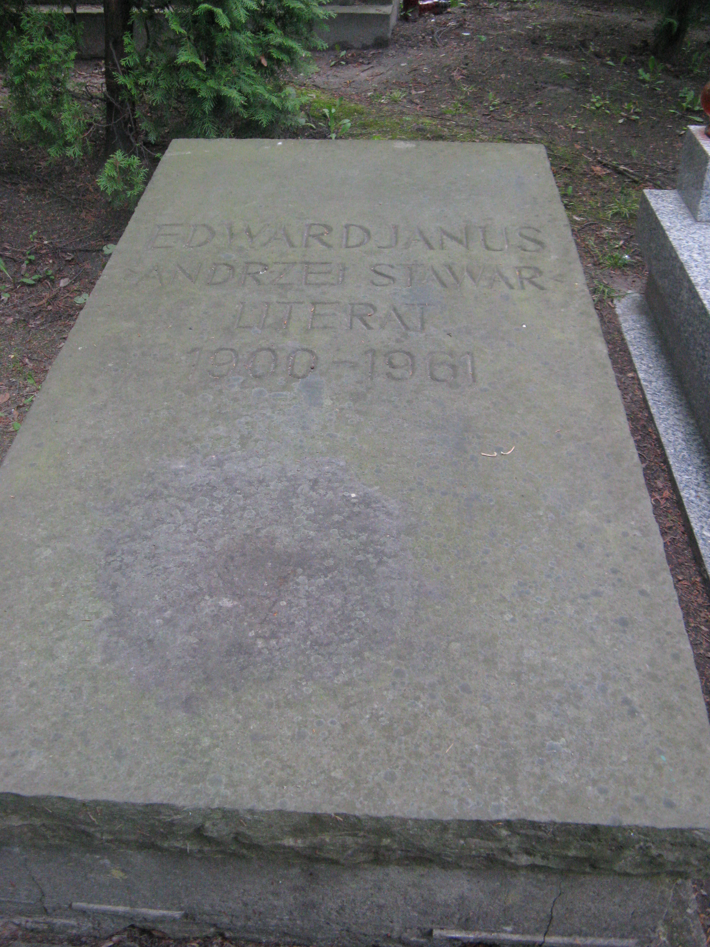 Grób pl: na Cmentarzu Wojskowym na Powązkach